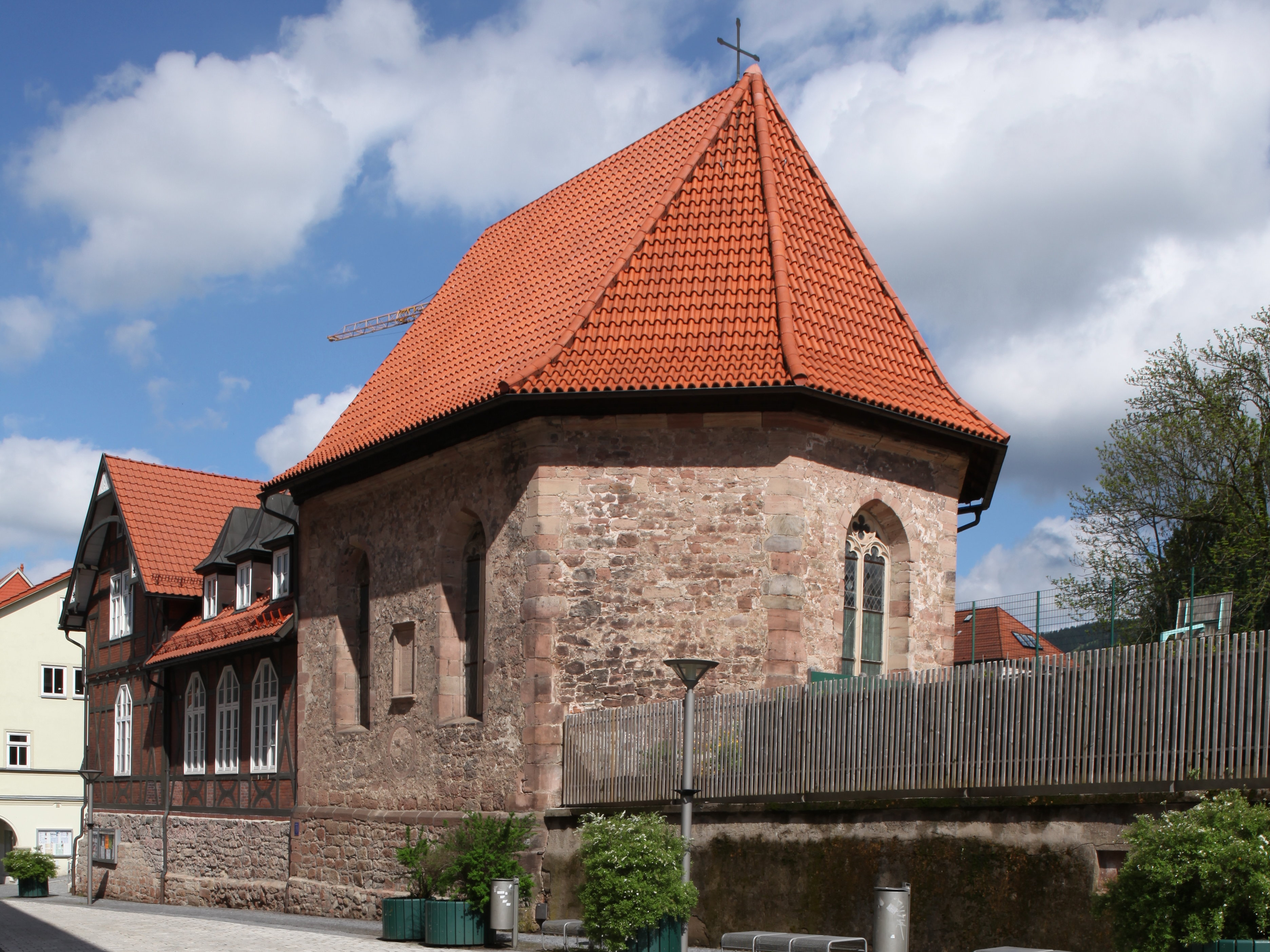 Kapelle zum Heiligen Kreuz, 1555 zur Gottesackerkirche erweitert, Chor 1618, in Suhl